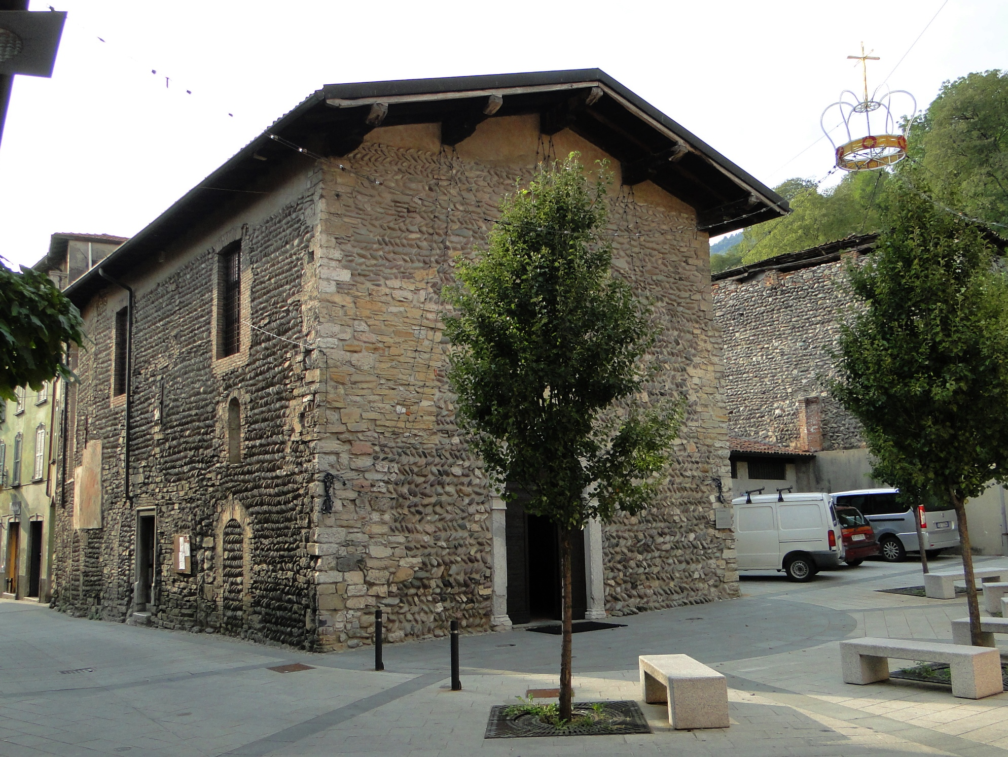 chiesa di San Sebastiano, Nembro (BG), Epoca di costruzione: seconda metà sec. XIV - prima metà sec. XV